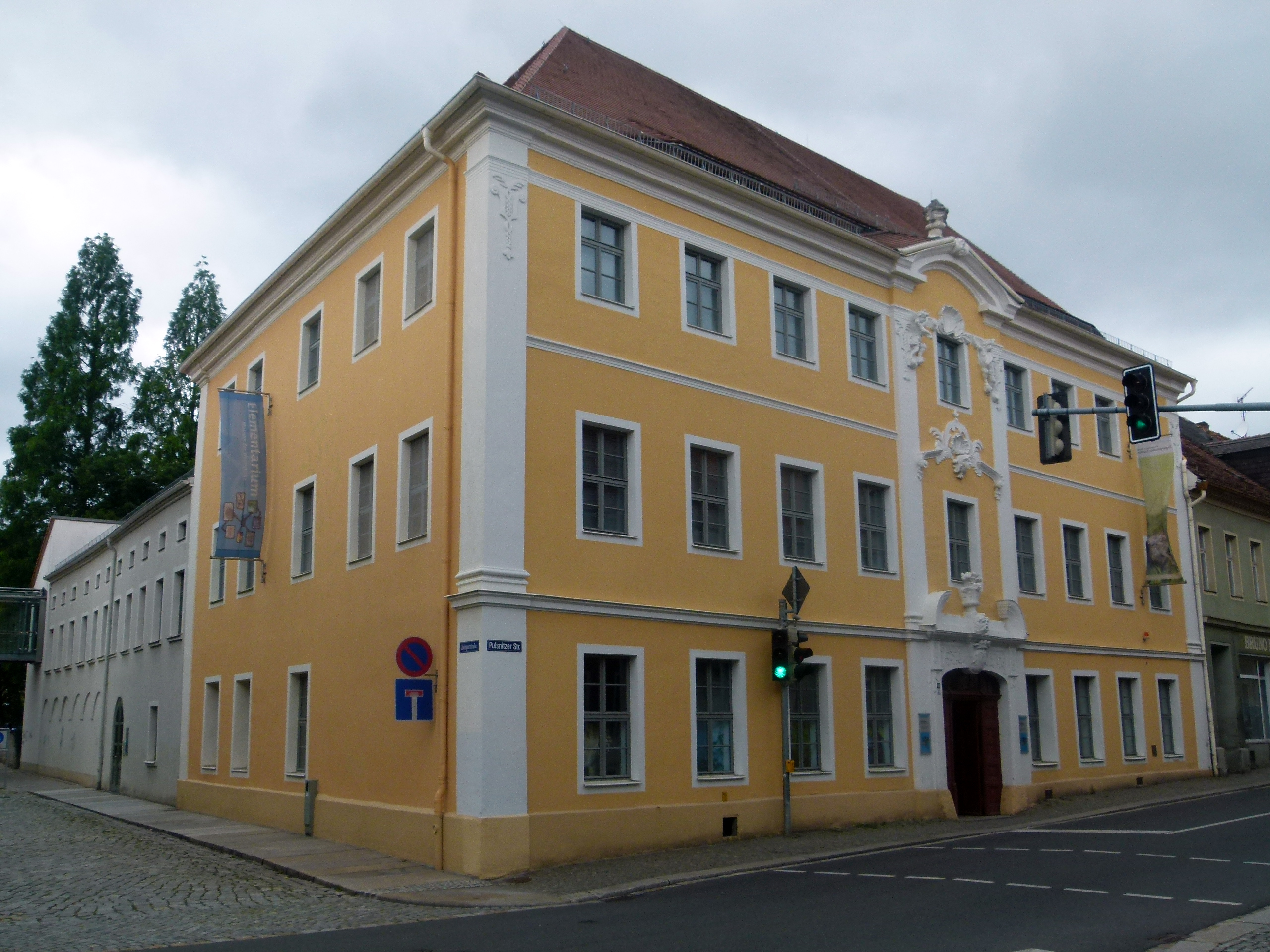 Denkmalgeschütztes Haus, Pulsnitzer Straße 16, Kamenz, Sachsen